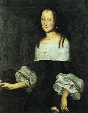 Katharina Elisabeth Freifrau von Galler, die „Gallerin“, zeitgenössisches Portrait, Riegersburg